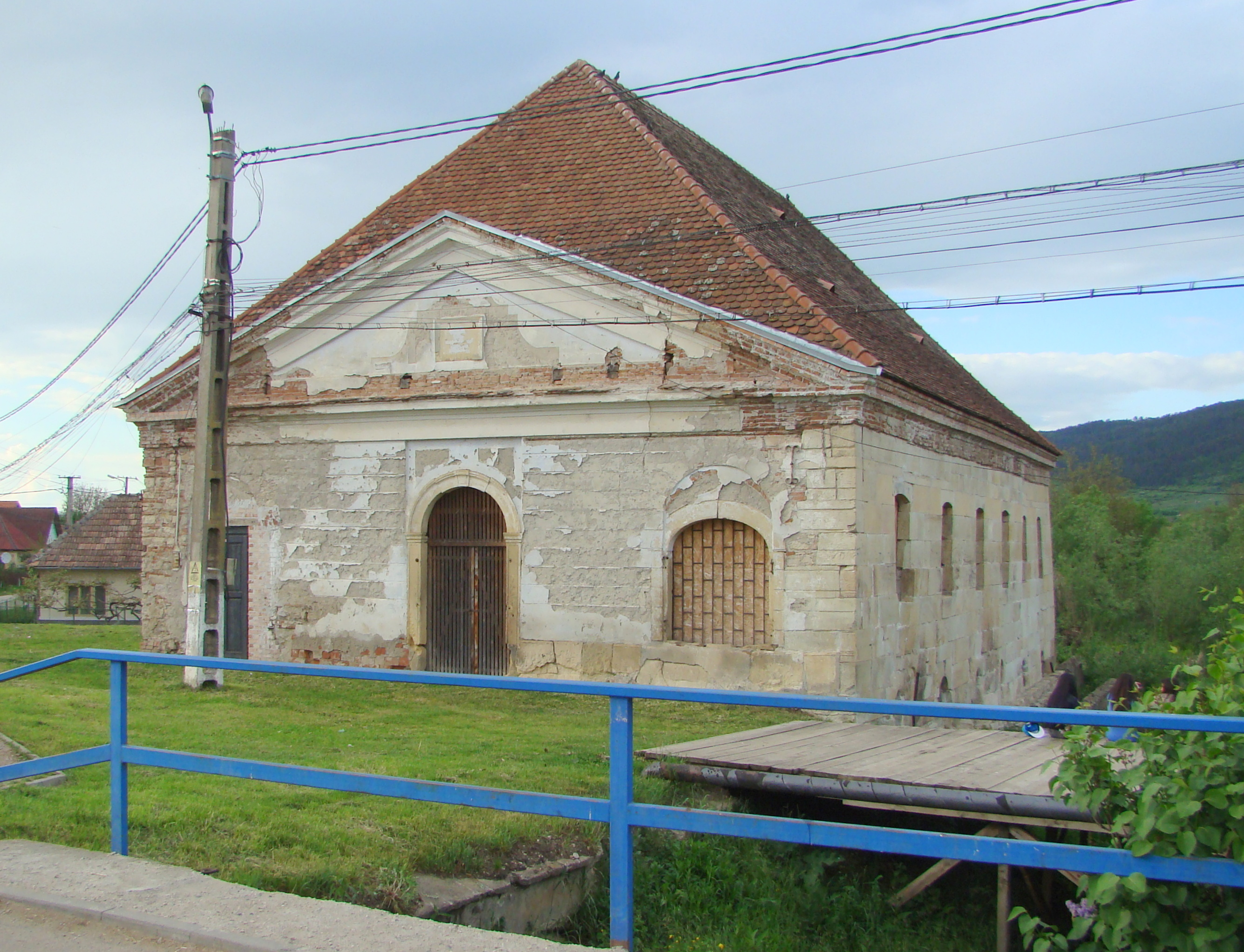 Moară, sat Bonțida; comuna Bonțida 04